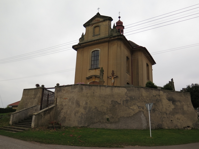 Kostel svatého Vavřince, Vršce.